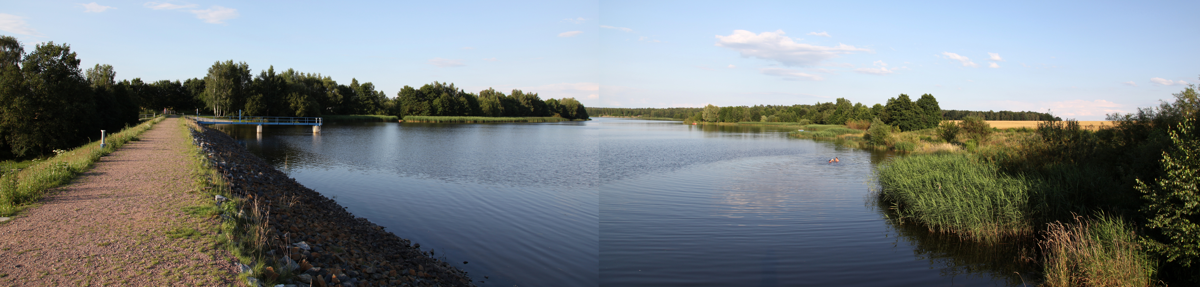 Panorama Talsperre Wallroda